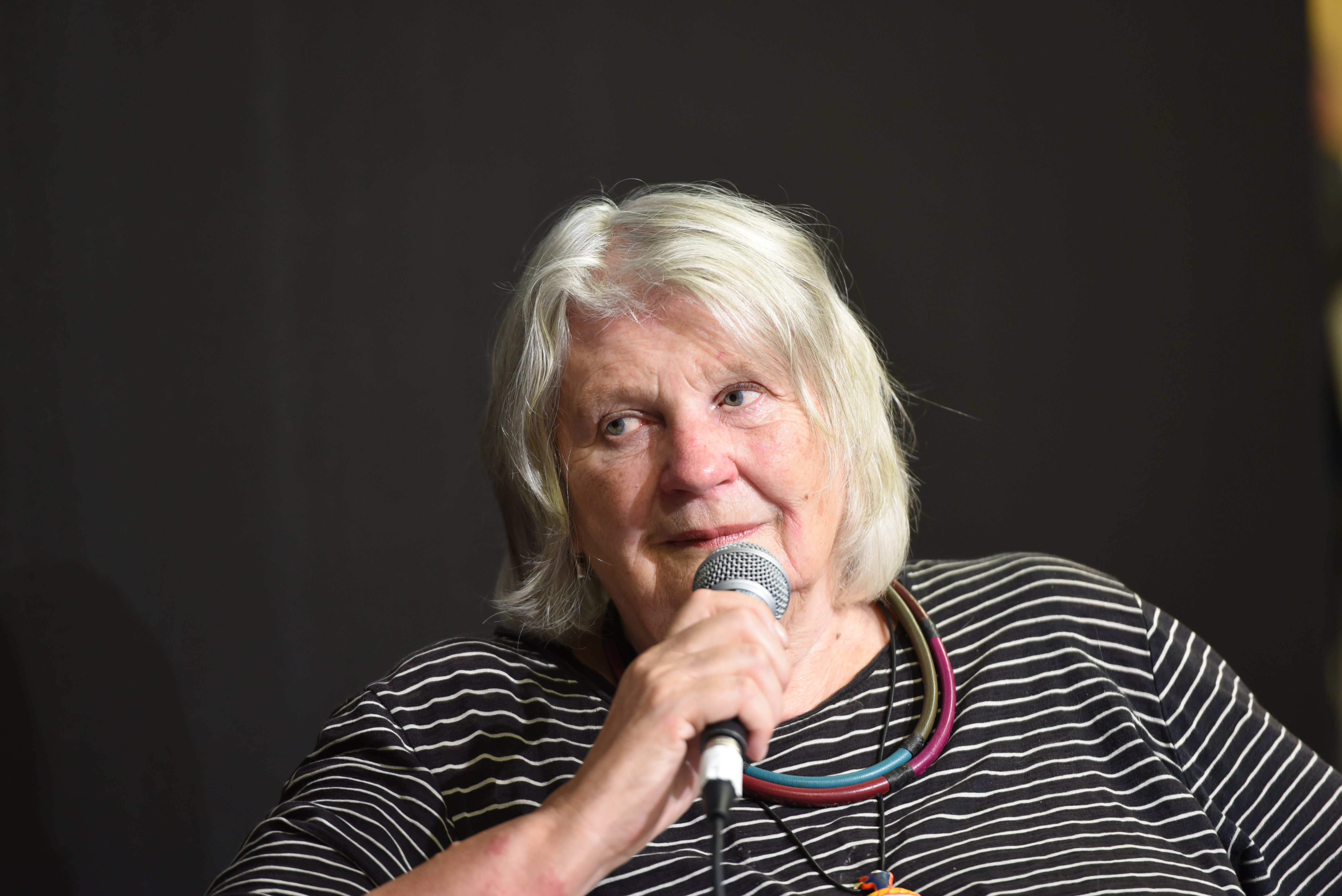 Journalisten, författaren och fotografen Karin Berglund på Bokmässan i Göteborg 2016.